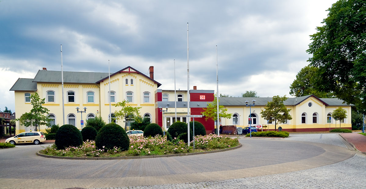 Bahnhof Soltau (Han): Vorplatz und Empfangsgebäude. Das Gebäude erhielt in den 1960er-Jahren einen Vorbau und wurde verputzt und angestrichen. Im Gebäude befinden sich ein Warteraum und Wohnungen. Der angebaute, ehemalige Eilgutschuppen (rechts) wird vom Ortsverein einer politischen Partei genutzt.